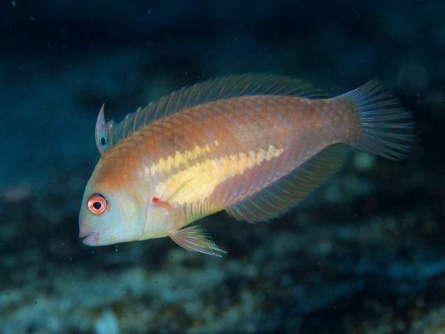 テンスモドキ Xyrichtys sciistius